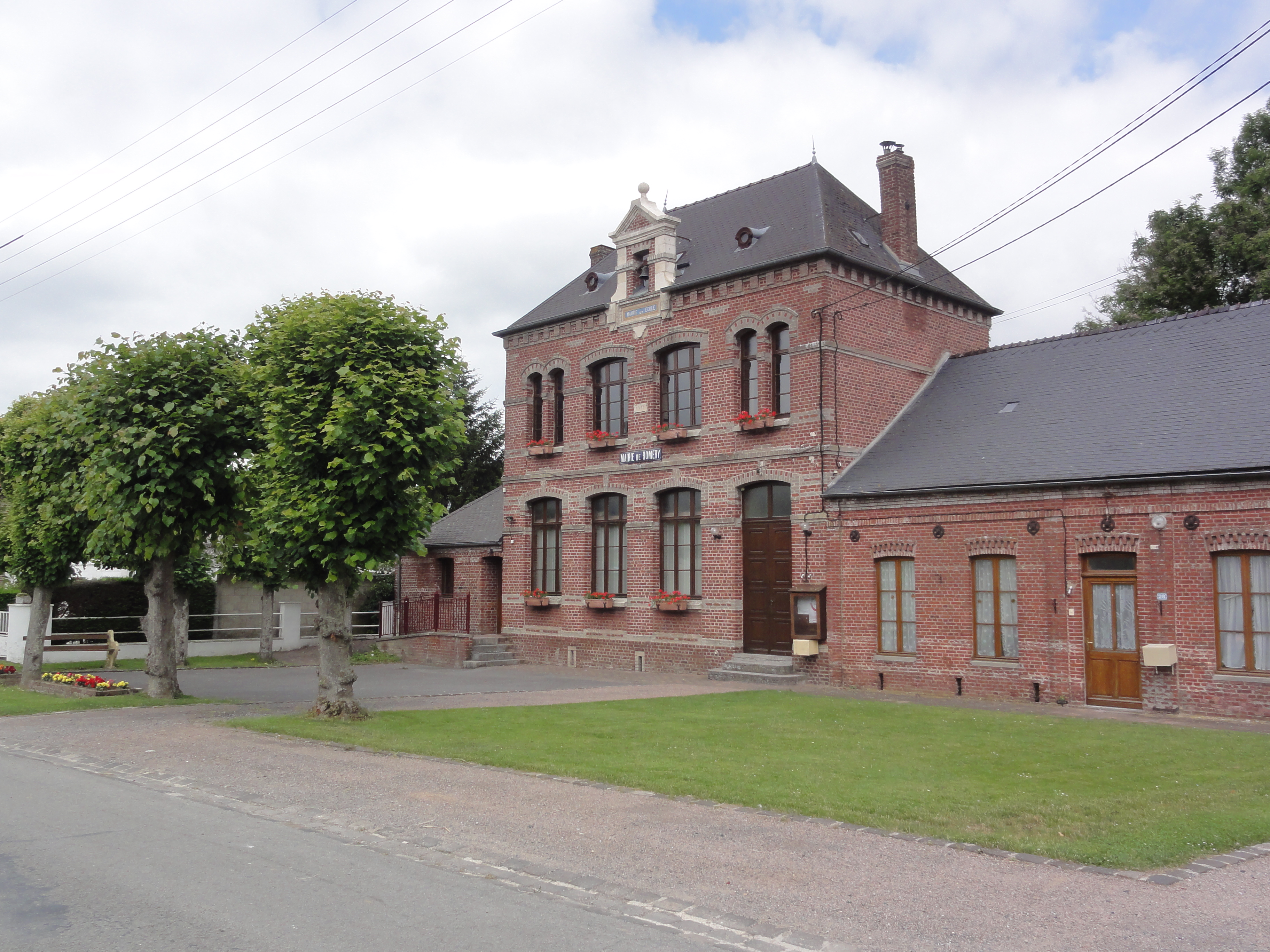 Romery (Aisne) mairie